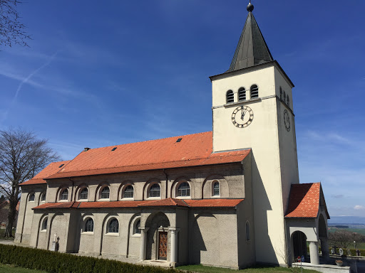 Eglise Notre-Dame de l'Assomption de Sommentier